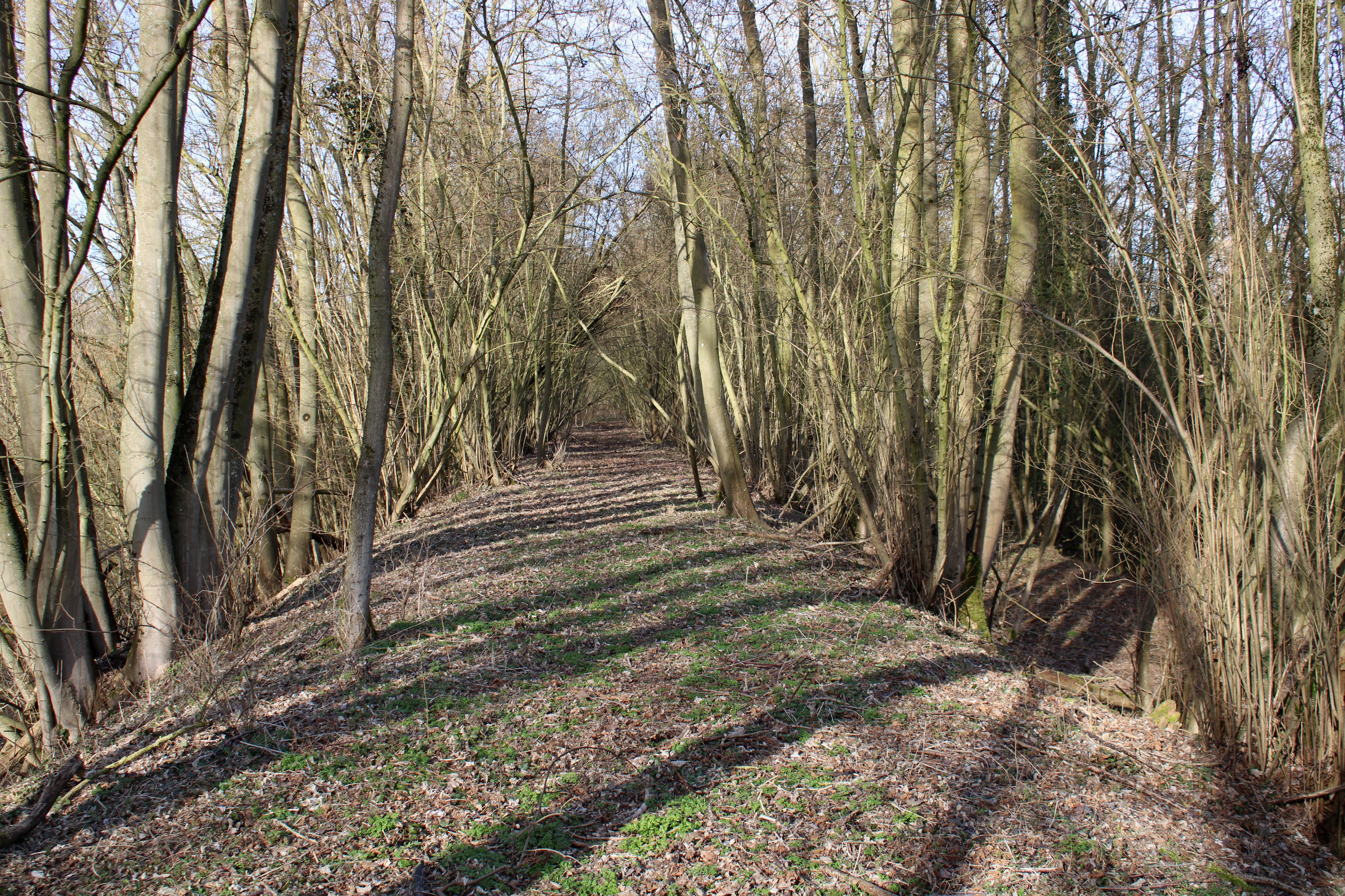 Tracé de l'ancienne voie ferrée de Saint-Quentin à Ham à Pithon